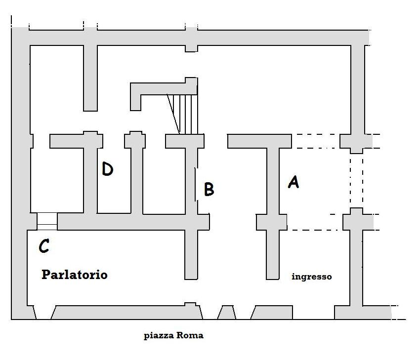 pianta dell'area del parlatorio dell'ex Monastero delle Clarisse in Cerreto Sannita (Bn): A) Monumento alla prima badessa Caterina Sanframondi; B) ruoto dei rejetti (oggi stipo a muro); C) grata del parlatorio dove le suore parlavano con i parenti; D) cella del carcere.